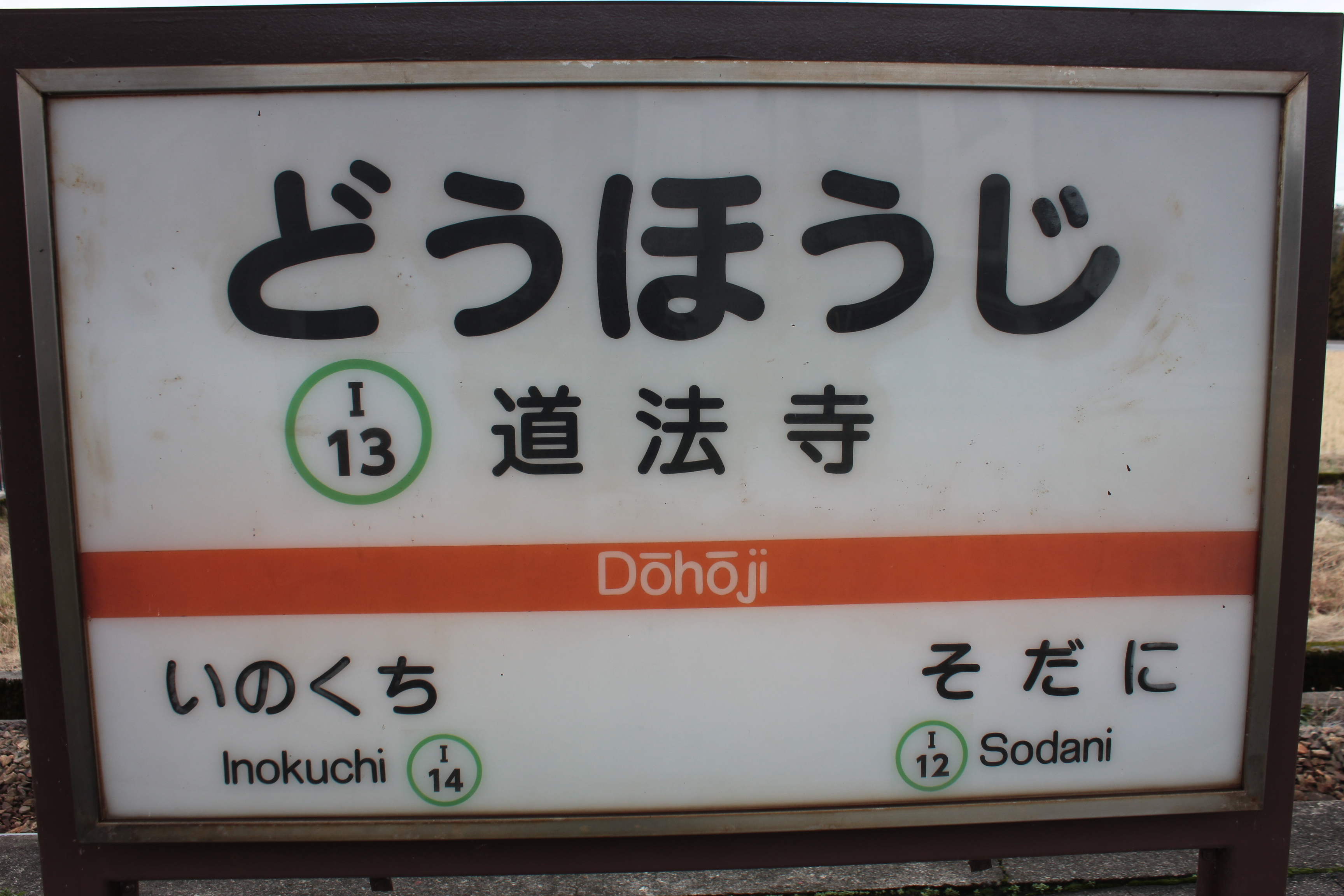 北陸鉄道石川線道法寺駅の駅名標。駅ナンバリングに対応している。 Canon EOS Kiss X5